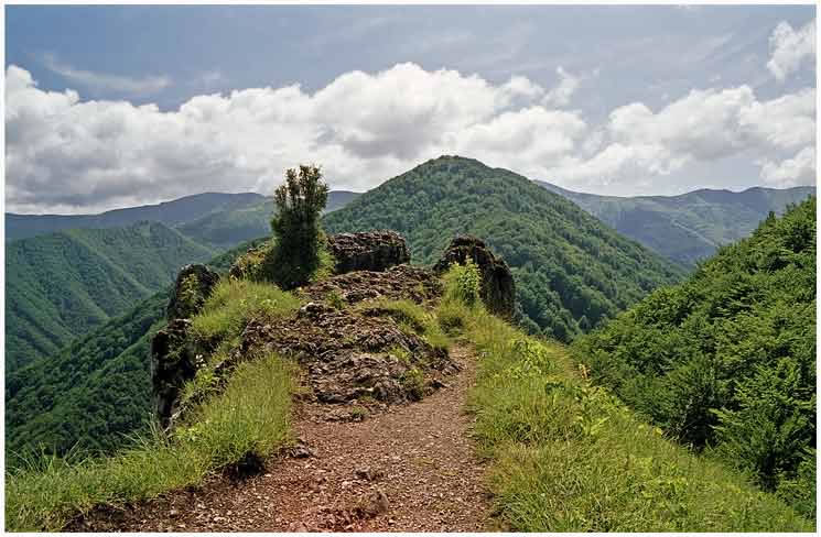 Baraniarky (1270 m) from Sokolie, Malá Fatra, district Žilina, Slovakia autor:Prazak Date: 7. 2004